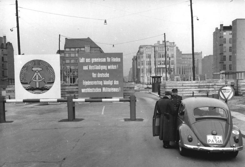 ADN-ZB-Stöhr-13.12.1961-Berlin: Grenzkontrollpunkt Friedrichstraße. Veröffentlichung nur mit Genehmigung der Pressestelle des MDI